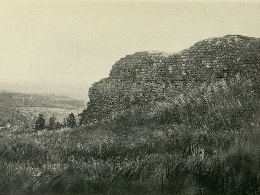 Ruines du château de Saint-Priest-en-Jarez vers 1900, Loire, France.